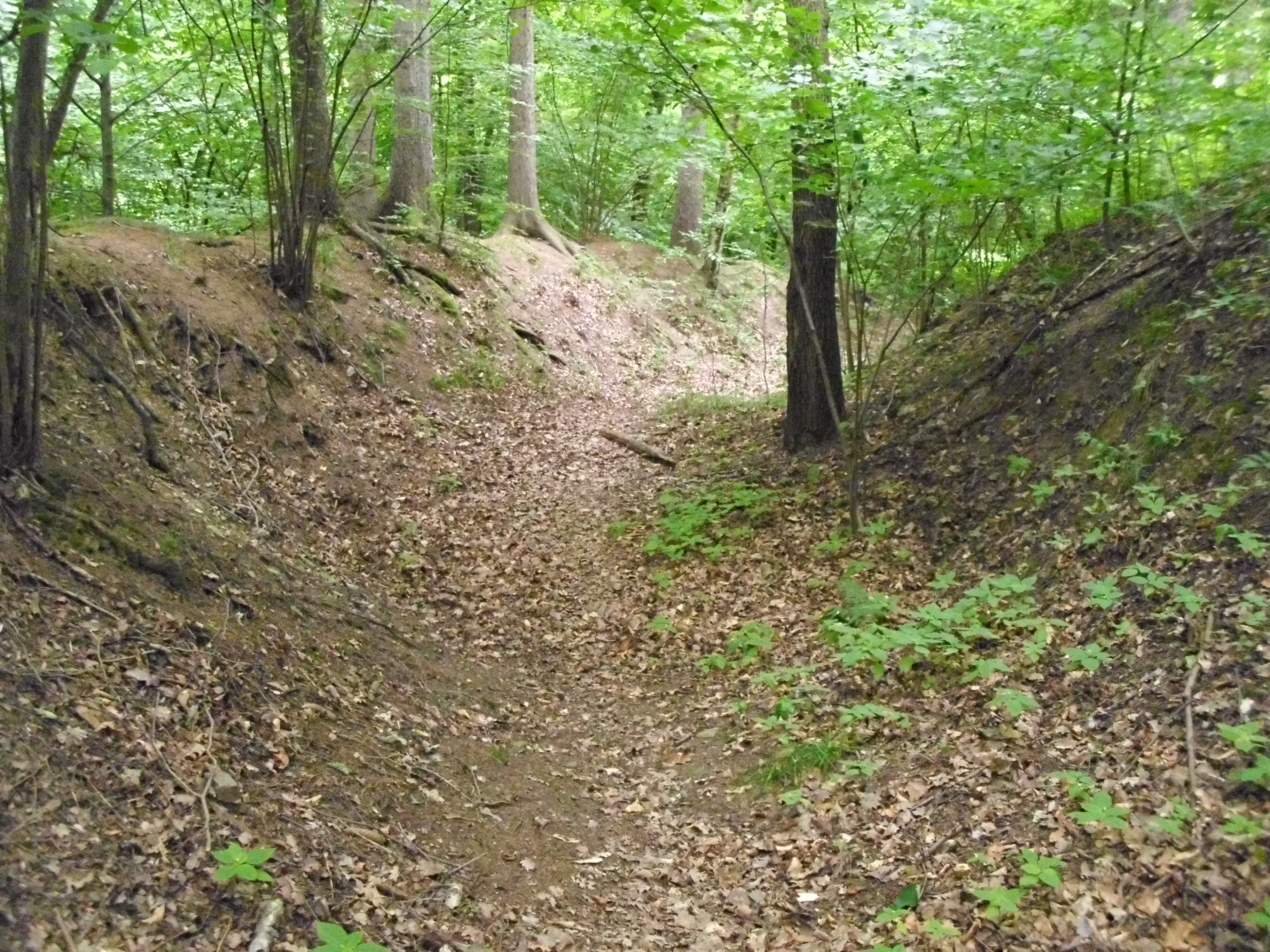 Dies ist einer der zwei Hohlwege der Alten Osterzgebirgischen Poststraße im Schwarzbachtal